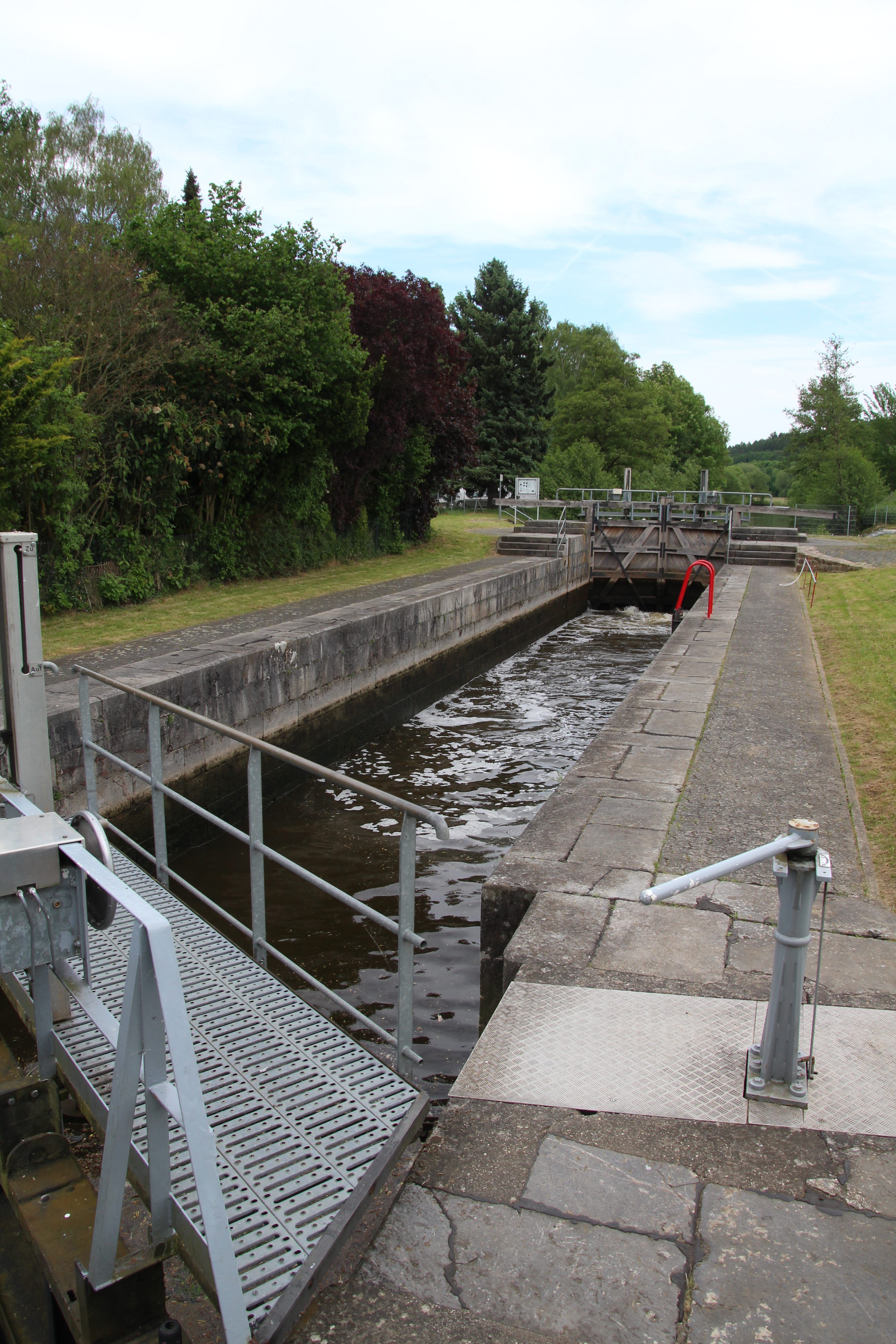 Lahnschleuse